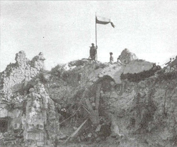 II Пољски корпус подиже пољску заставу на рушевинама манастира Монте Касино.